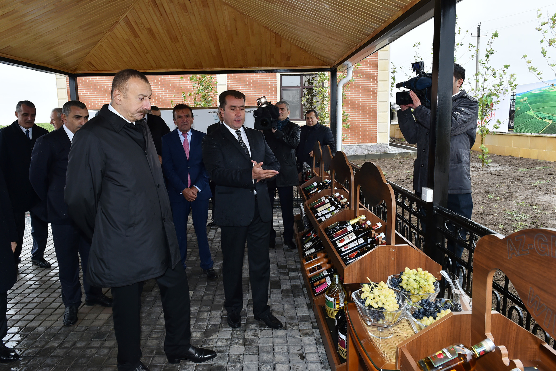 İlham Əliyev Şamaxıda “Az-Granata” MMC-yə məxsus üzüm bağları ilə tanış olarkən